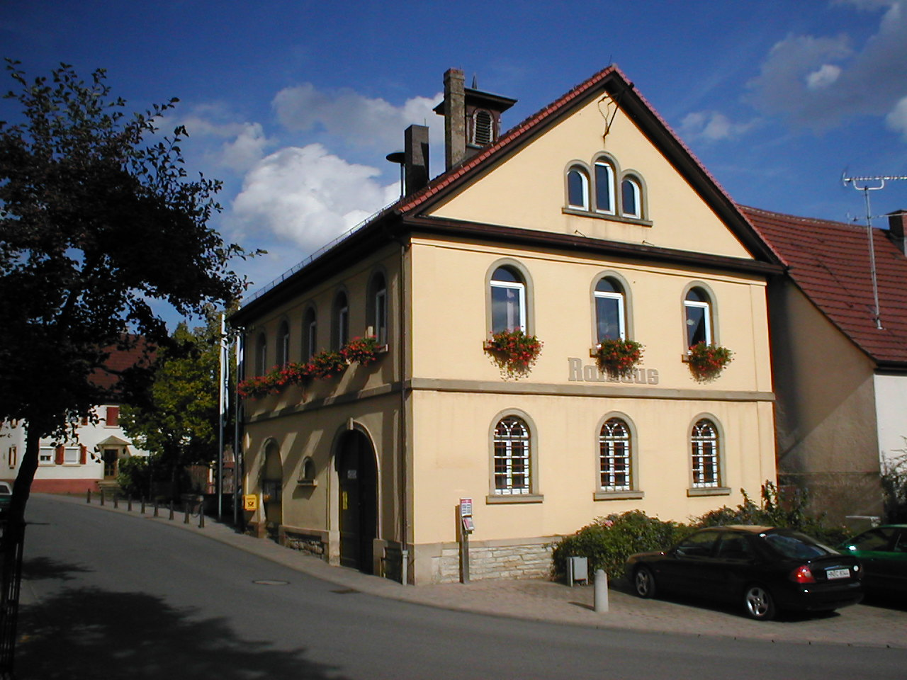 Rathaus von Duttenberg, erbaut 1846